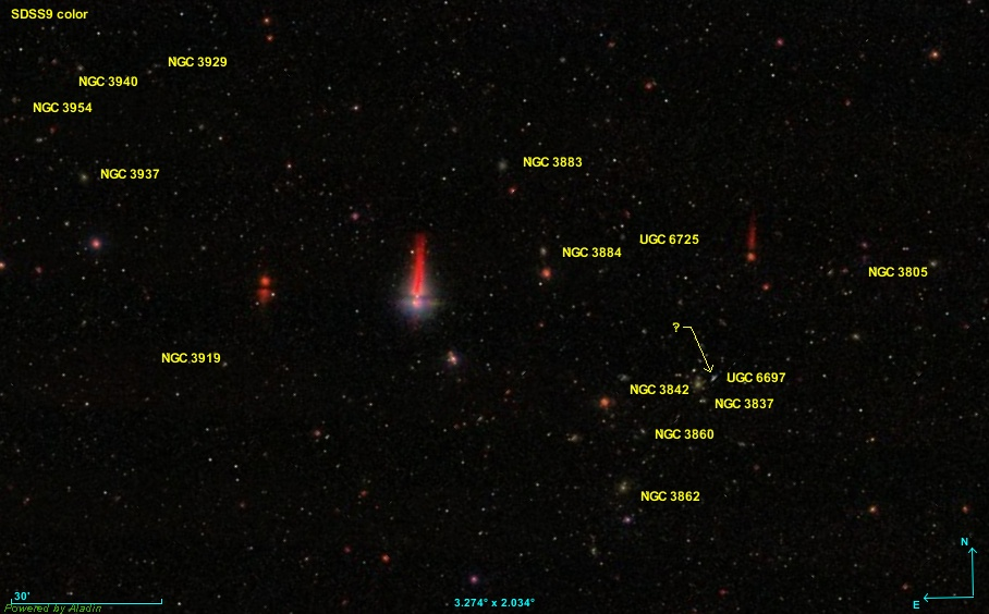 Réalisée avec Aladin et les donnée SDSS